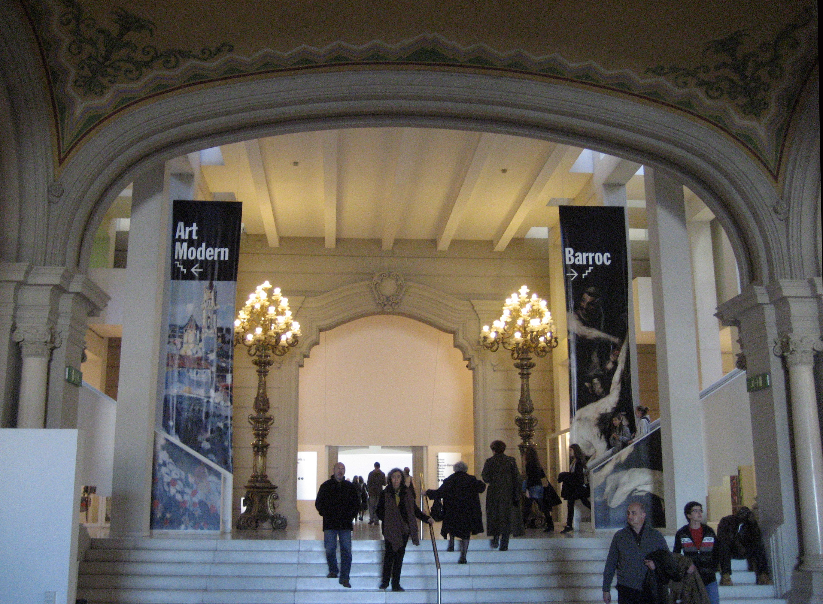 Vetíbulo del Palacio Nacional de Barcelona, Cataluña.Spain